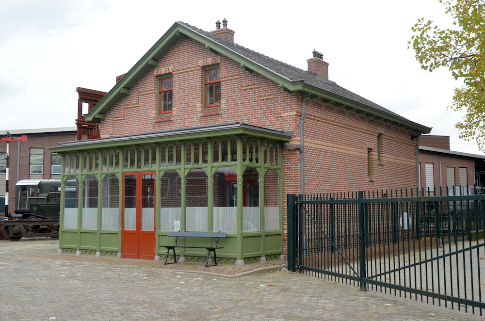 Nederlands Spoorwegmuseum Dienstwoning uit Bilthoven. Foto: Erik Swierstra.